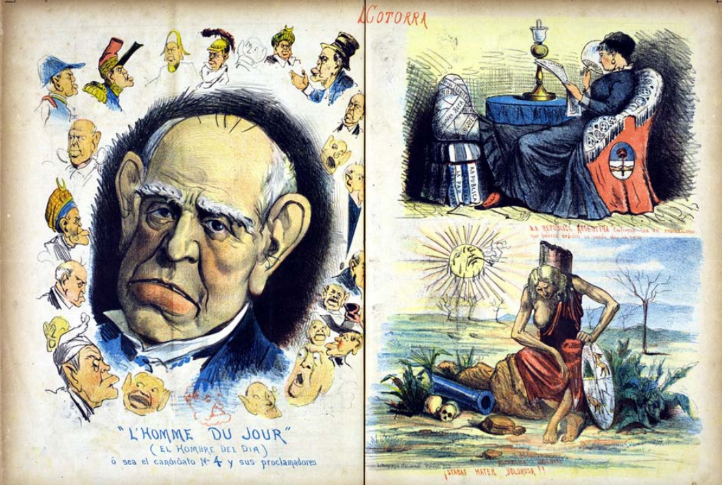 La Cotorra, 21-03-1880